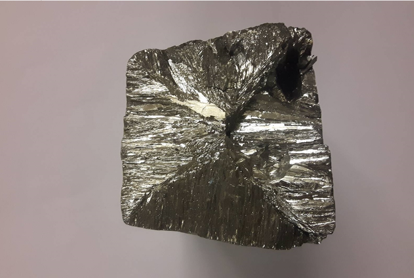 Ristlõige telluurikangist